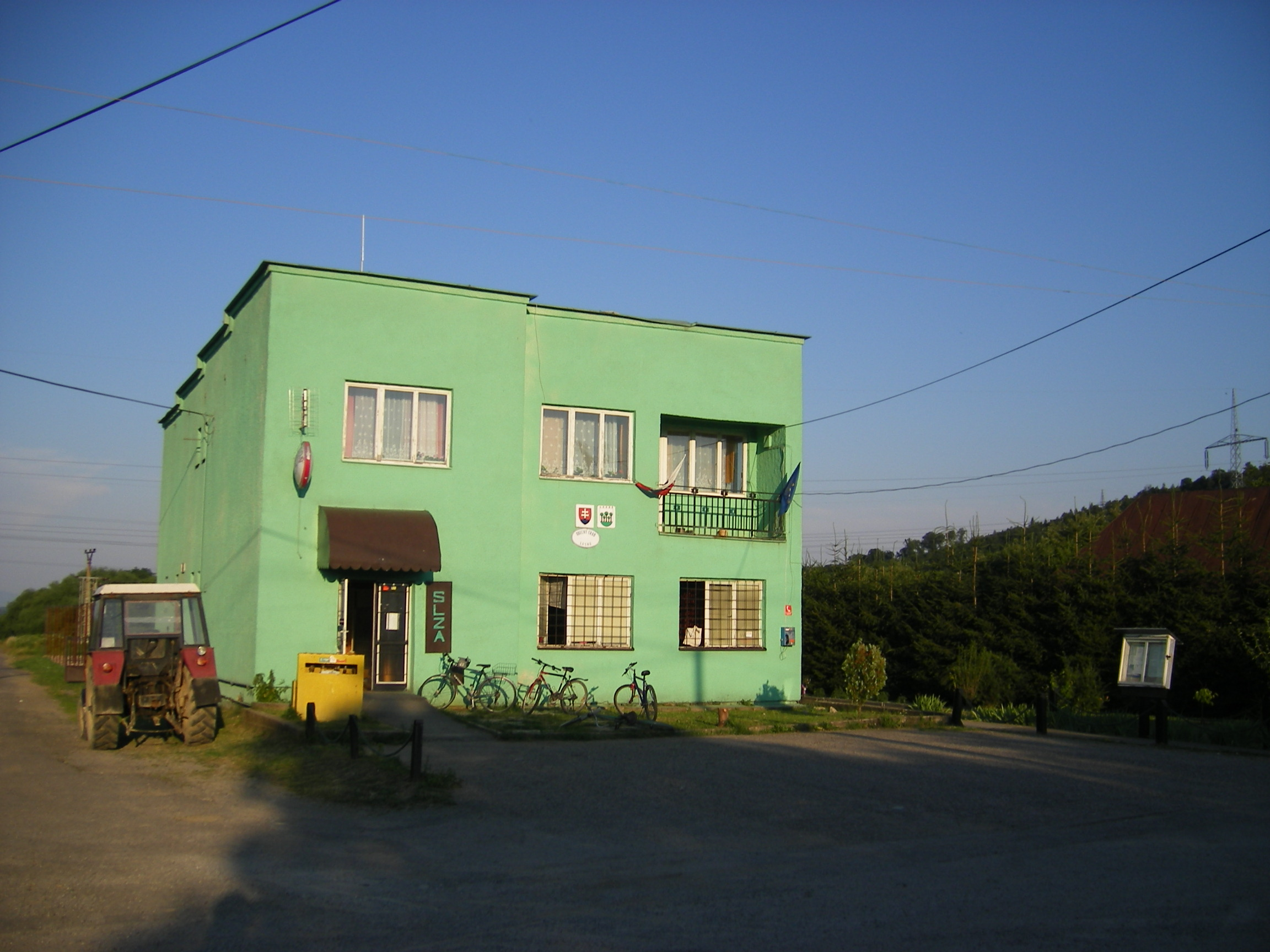 Lesné, okres Michalovce